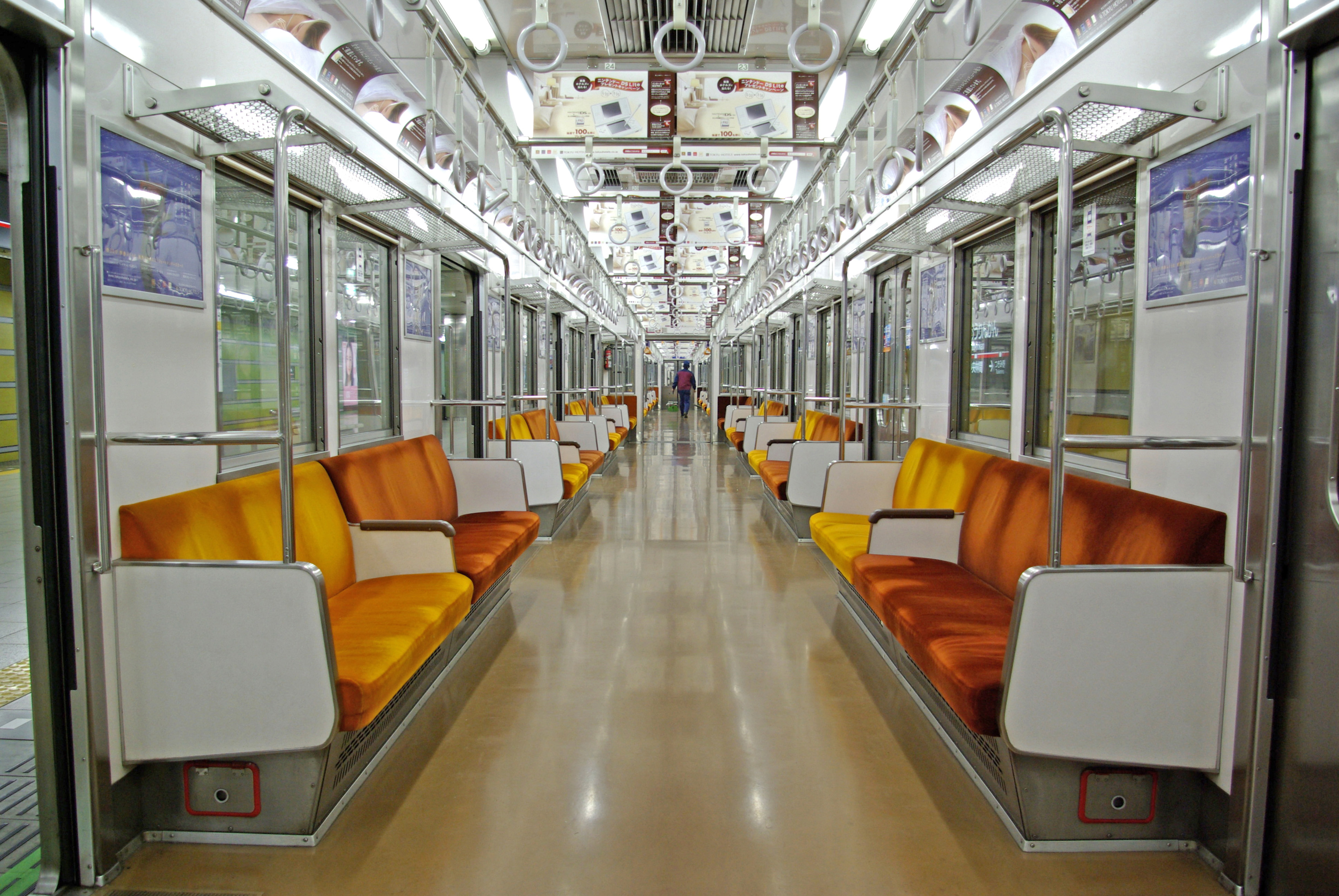 東急8500系 デハ8973号（18-1次車）車内